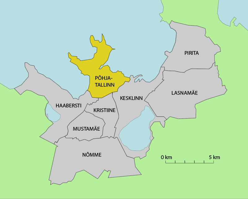 Kaart Põhja-Tallinna linnaosa paiknemisest Tallinnas.